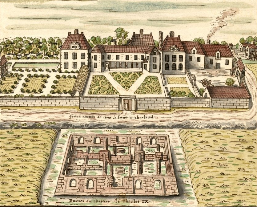 Veüe du Chasteau DE CHARLEVAL en Normandie a cinq lieües en deça de Rouen dans le Vexin Normand, avec les Ruisnes du Chasteau que Charles IX y avait commencé. 1696